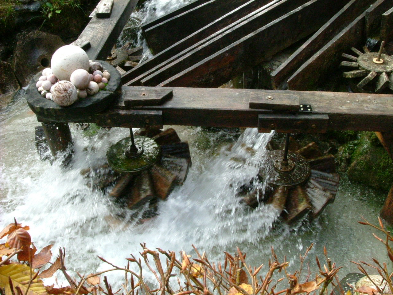 Deutschlands einzige noch in Betrieb befindliche Kugelmühle in der Almbachklamm; bevorzugt werden Kugeln aus Unterberger Marmor hergestellt